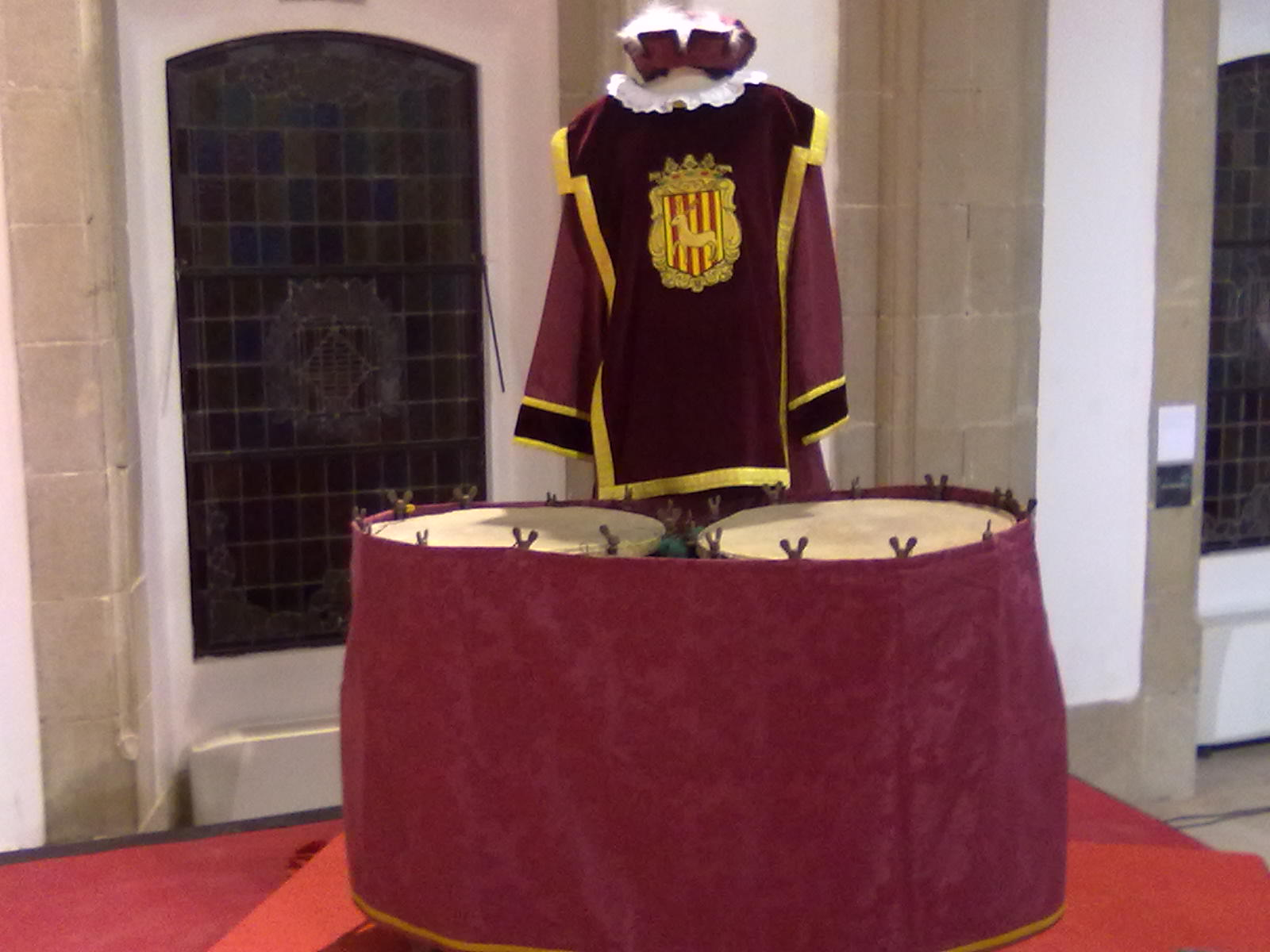 Timbales a peu originals del segle XVIII. Exposició de l'Àliga 2013.